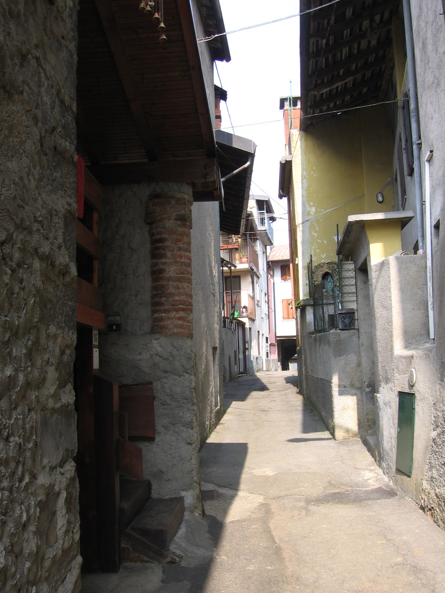 Contrada Cima Peia.Peia (BG), Italia